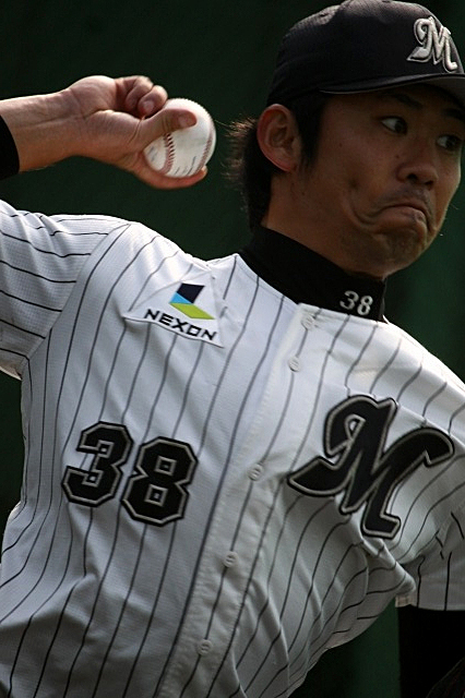 日本プロ野球 千葉ロッテマリーンズ 中郷大樹 投手